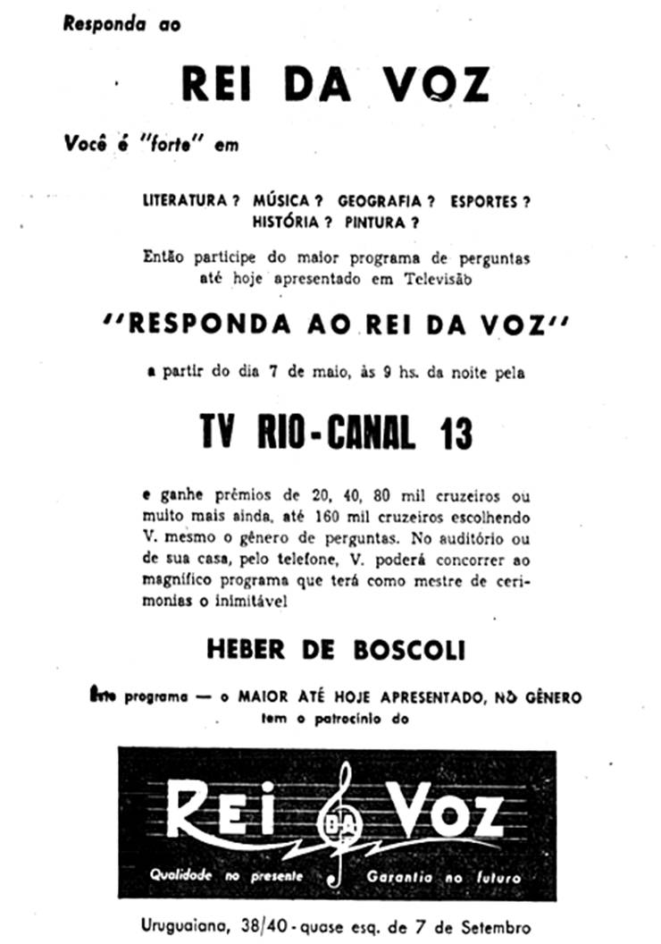 TV RIO Responda ao Rei da Voz programa de perguntas sem limite de prêmios